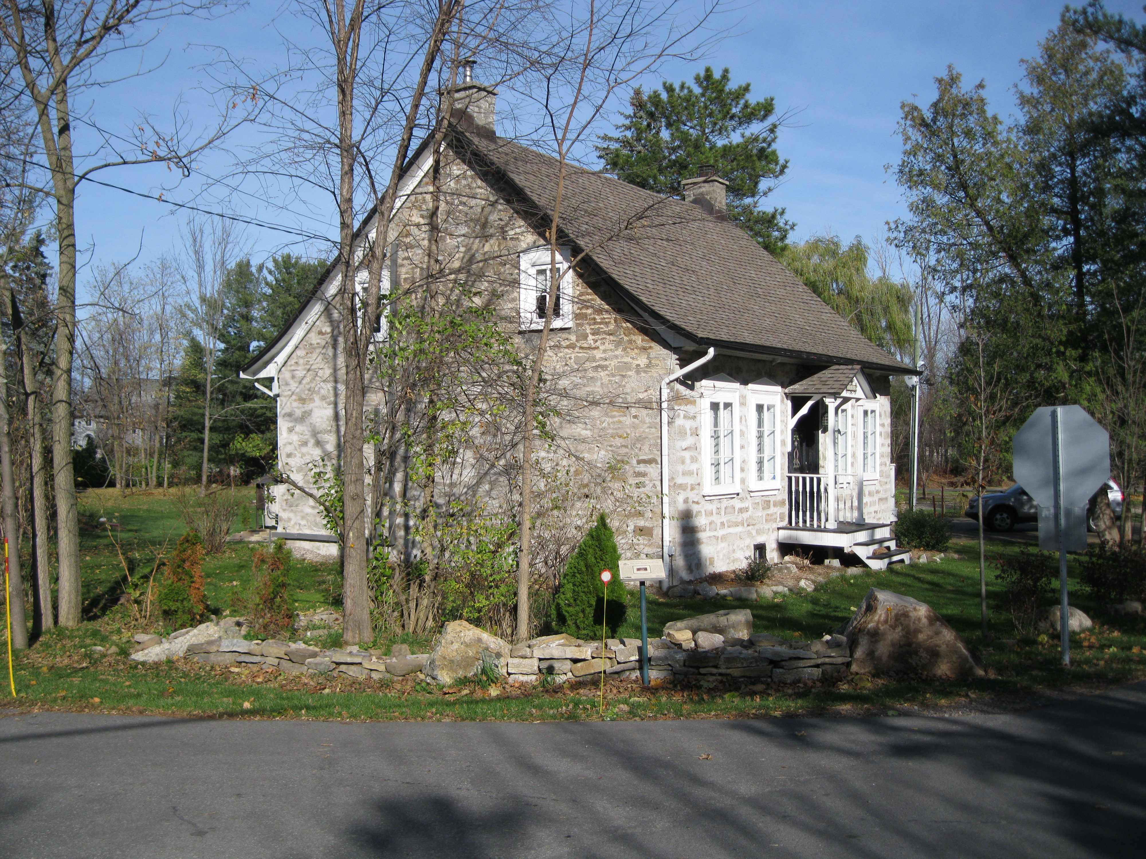 Maison François-Lalonde, 1799, chemin du Bord-du-Lac, L'Île-Bizard—Sainte-Geneviève (Montréal)